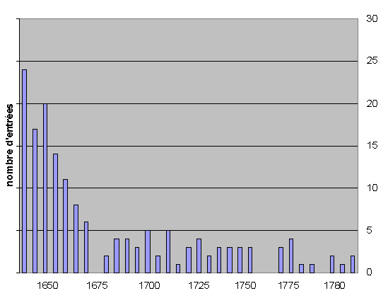 tableau chronologique des entrées au monastère Sainte-Cécile